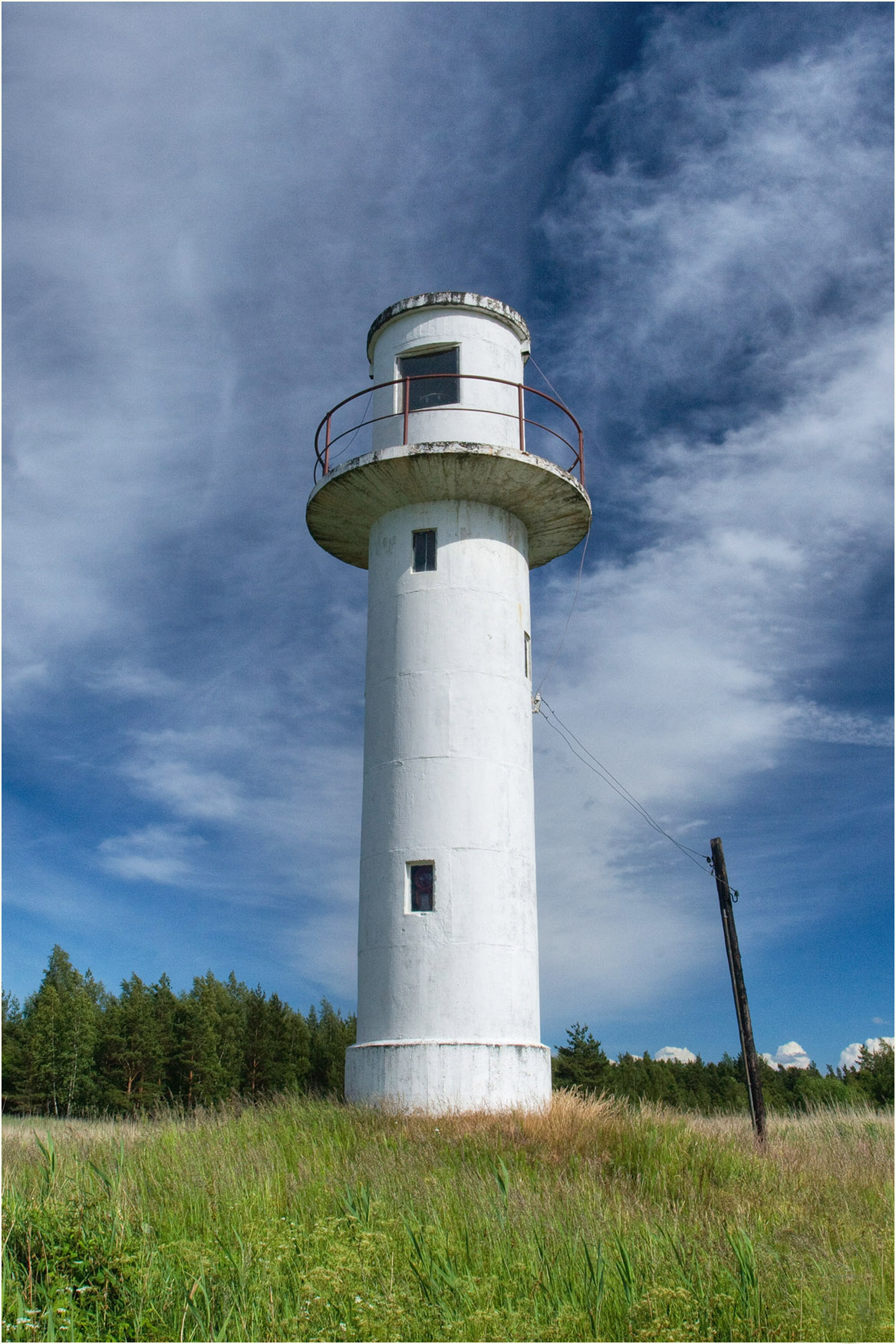 Paslepa alumine tulepaak